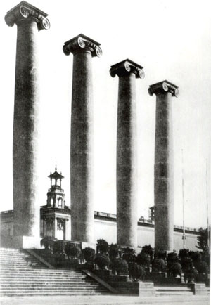 Les Quatre columnes eren 4 columnes, amb capitells corintis o jònics, obra de l'arquitecte Puig i Cadafalch, aixecades l'any 1919 a on actualment hi ha la font de Montjuïc, a Barcelona (Espanya). Simbolitzaven les 4 barres de la Senyera catalana, que estaven destinades a convertir-se en un dels símbols del catalanisme. Motiu pel qual van ser enderrocades l'any 1928, durant la dictadura de Primo de Rivera, que va eliminar sistemàticament tots els símbols públics de catalanisme, per tal que no tinguessin el resó que li podia donar l'Exposició Universal de 1929 que havia de tenir lloc a Montjuïc. Pel mateix motiu la dictadura va anomenar finalment Poble Espanyol, a la mateixa muntanya, al que s'havia de dir Iberona, en homenatge als Ibers, primers pobladors de les terres catalanes, i va anomenar així la Plaça d'Espanya, col·locant dues torres venecianes. Les Quatre Columnes.